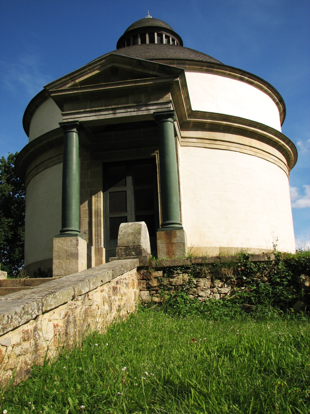 Mausolé de Georges Cadoudal. Village de Kerléano, Auray (Morbihan, France).